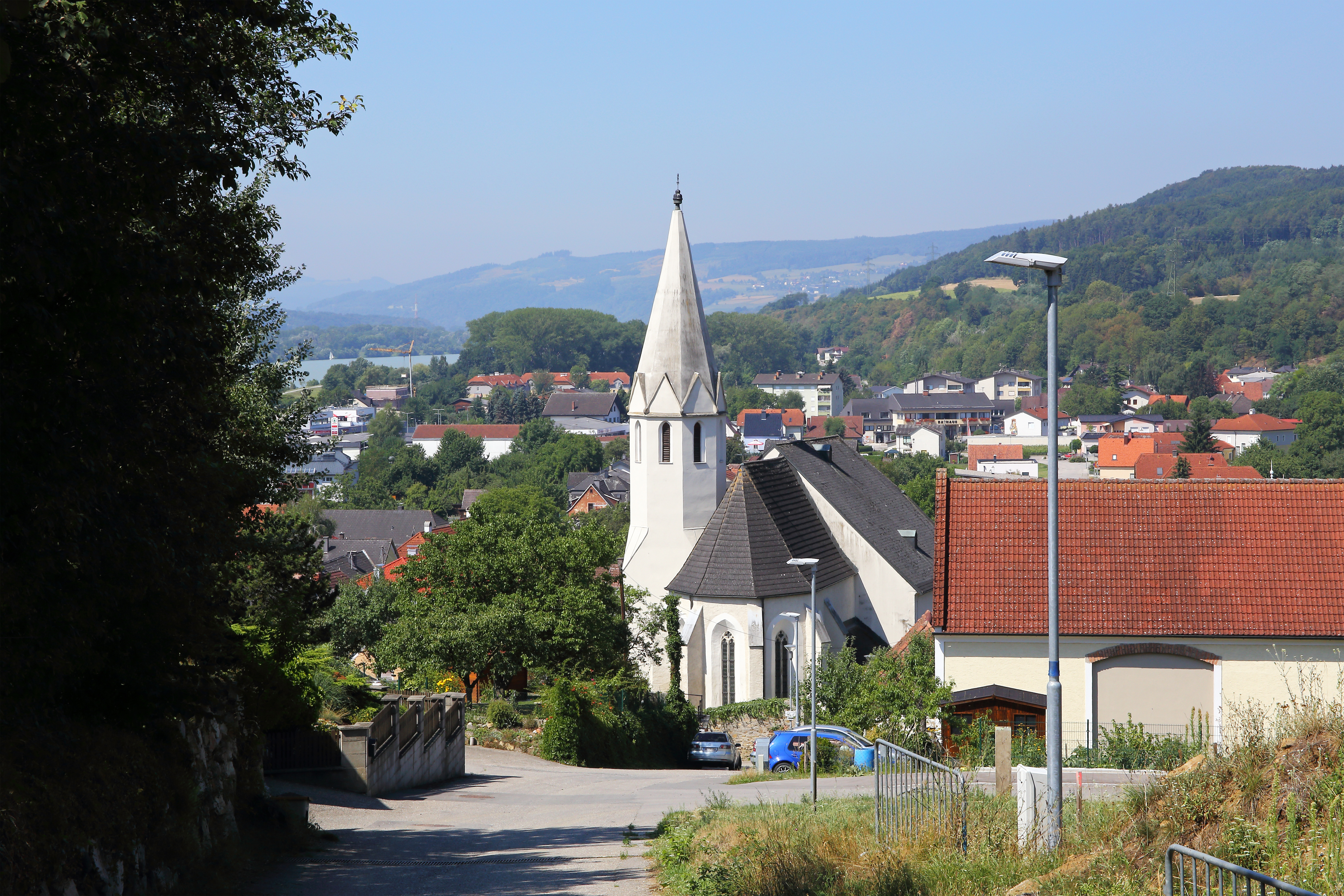 Die erhöht im Nordosten von Klein-Pöchlarn gelegene Pfarrkirche hl. Otmar ist eine spätgotische Hallenkirche mit Netzrippengewölbe.